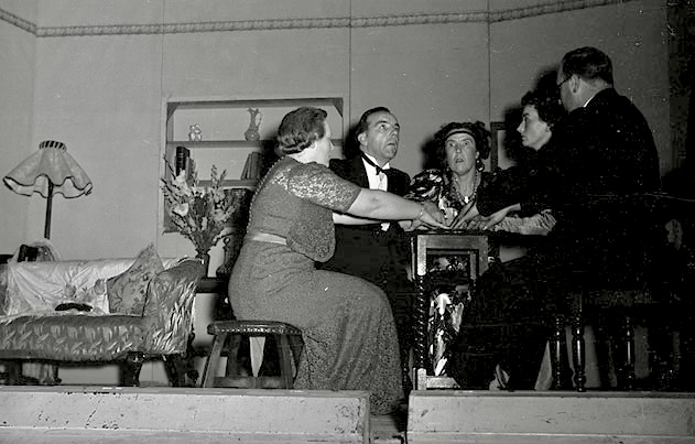 Teitl Cymraeg/Welsh title:"Blithe Spirit" gan Noel Coward, a berfformiwyd yn Wem, Hydref 1948. Ffotograffydd/Photographer: Geoff Charles (1909-2002) Dyddiad/Date: October 22, 1948. Cyfrwng/Medium: Negydd ffilm / Film negative Cyfeiriad/Reference: (gcc06442) Rhif cofnod / Record no.: 3472924 Rhagor o wybodaeth am gasgliad Geoff Charles yn Llyfrgell Genedlaethol Cymru More information about the Geoff Charles Collection at the National Library of Wales Mae ffotograffau Geoff Charles hefyd yn rhan o Broject Europeana Libraries Geoff Charles' photographs also form part of the Europeana Libraries Project